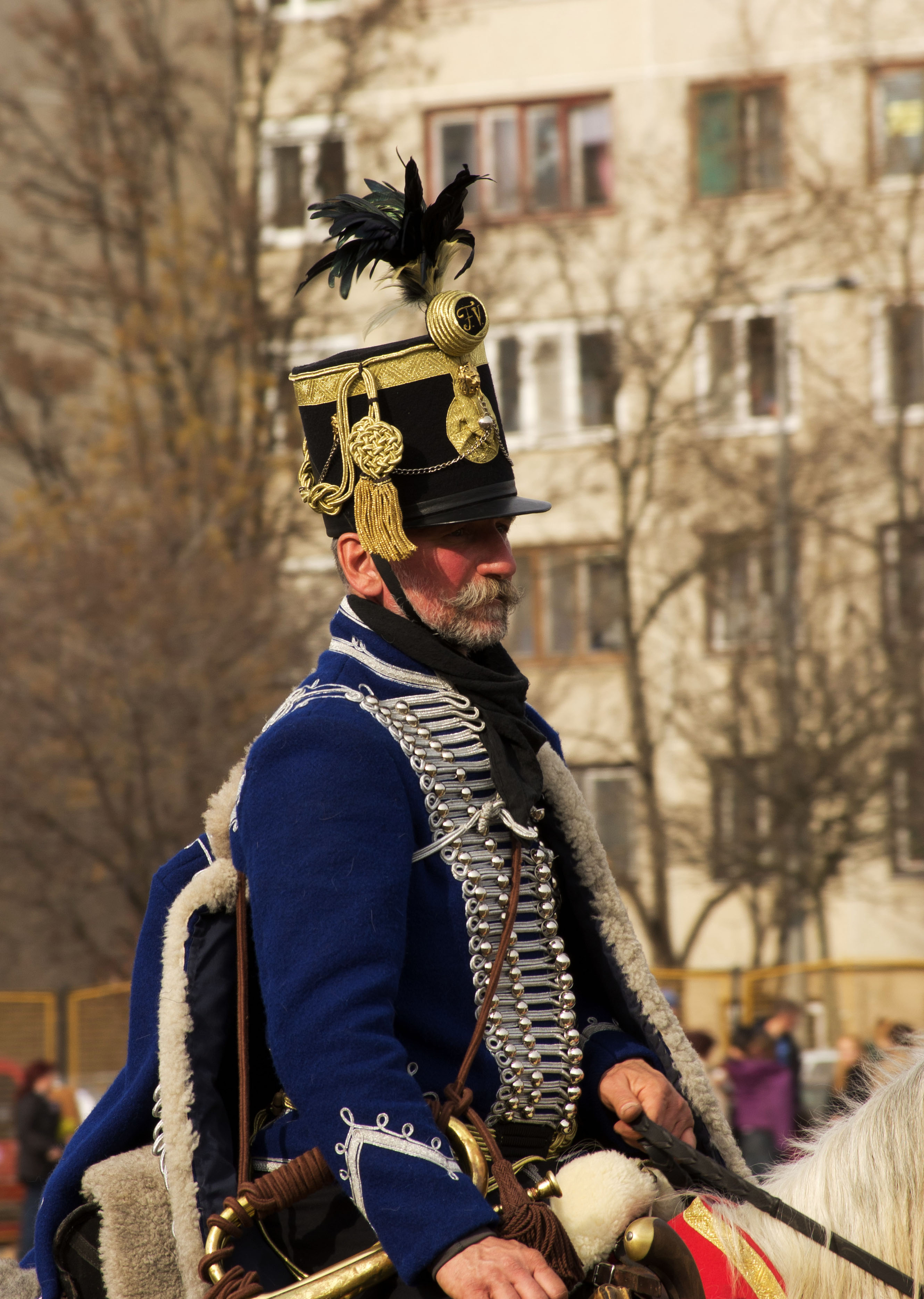 Huszár II. fején tiszti huszárcsákó, melynek tetején elöl a csákórózsa sodort aranyszálakkal körülvarrva, közepén fekete alapon aranyszálakkal hímzett F.V. névjel, 2012. március 15. Kecskemét